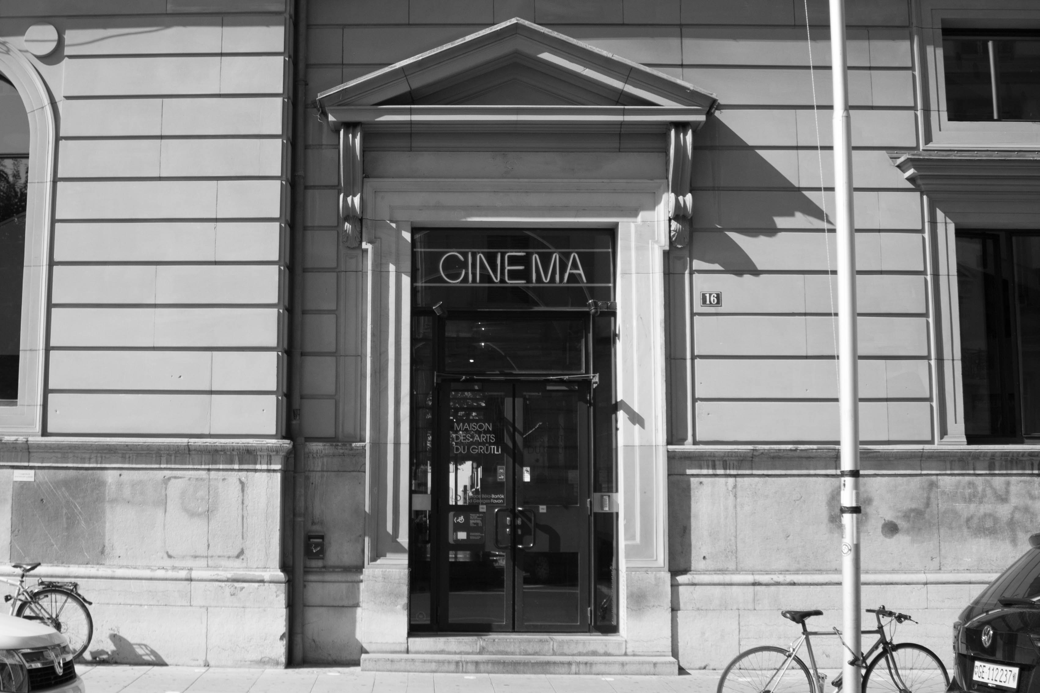 Entrée par la rue Général-Dufour 16